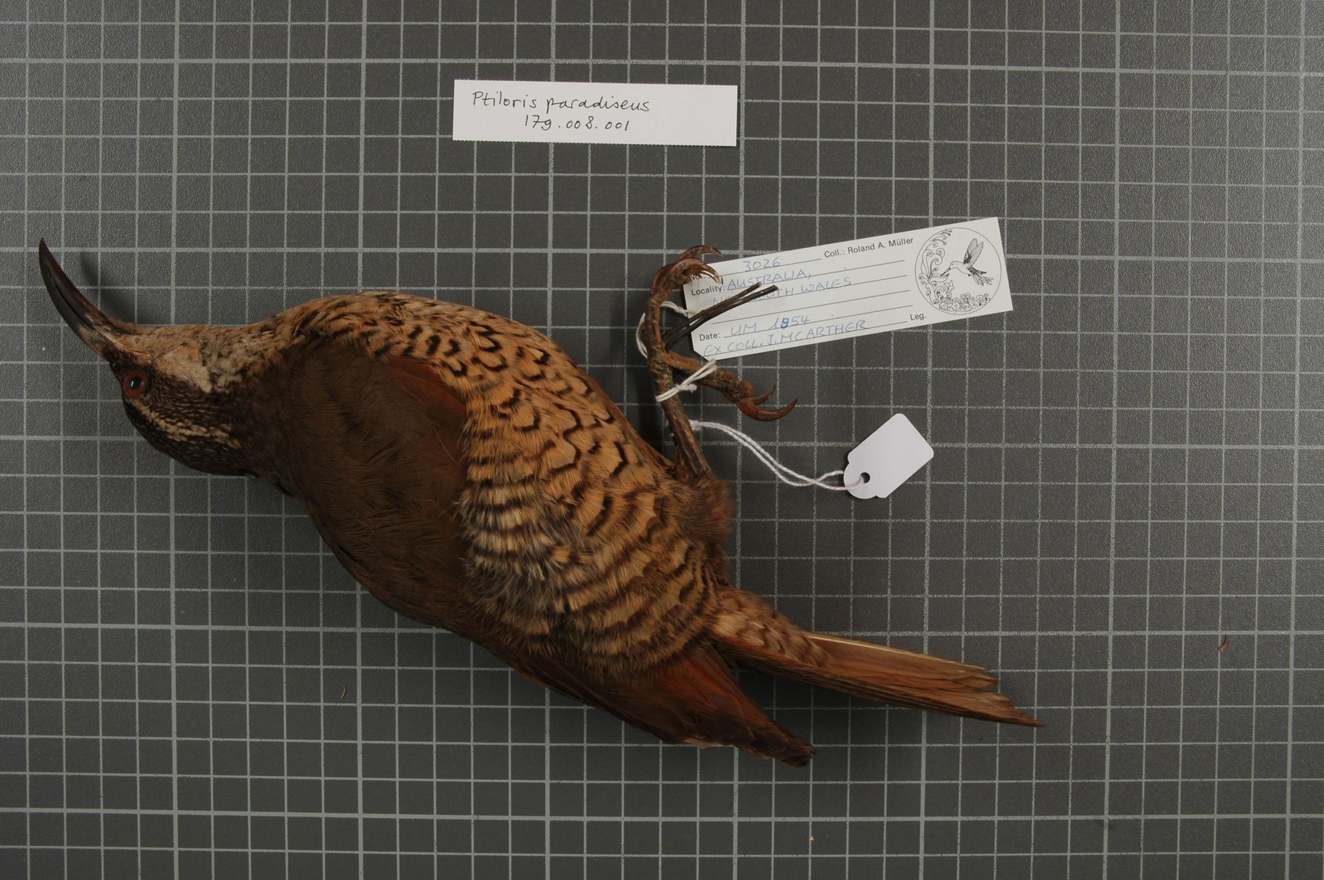 Ptiloris paradiseus Swainson, 1825